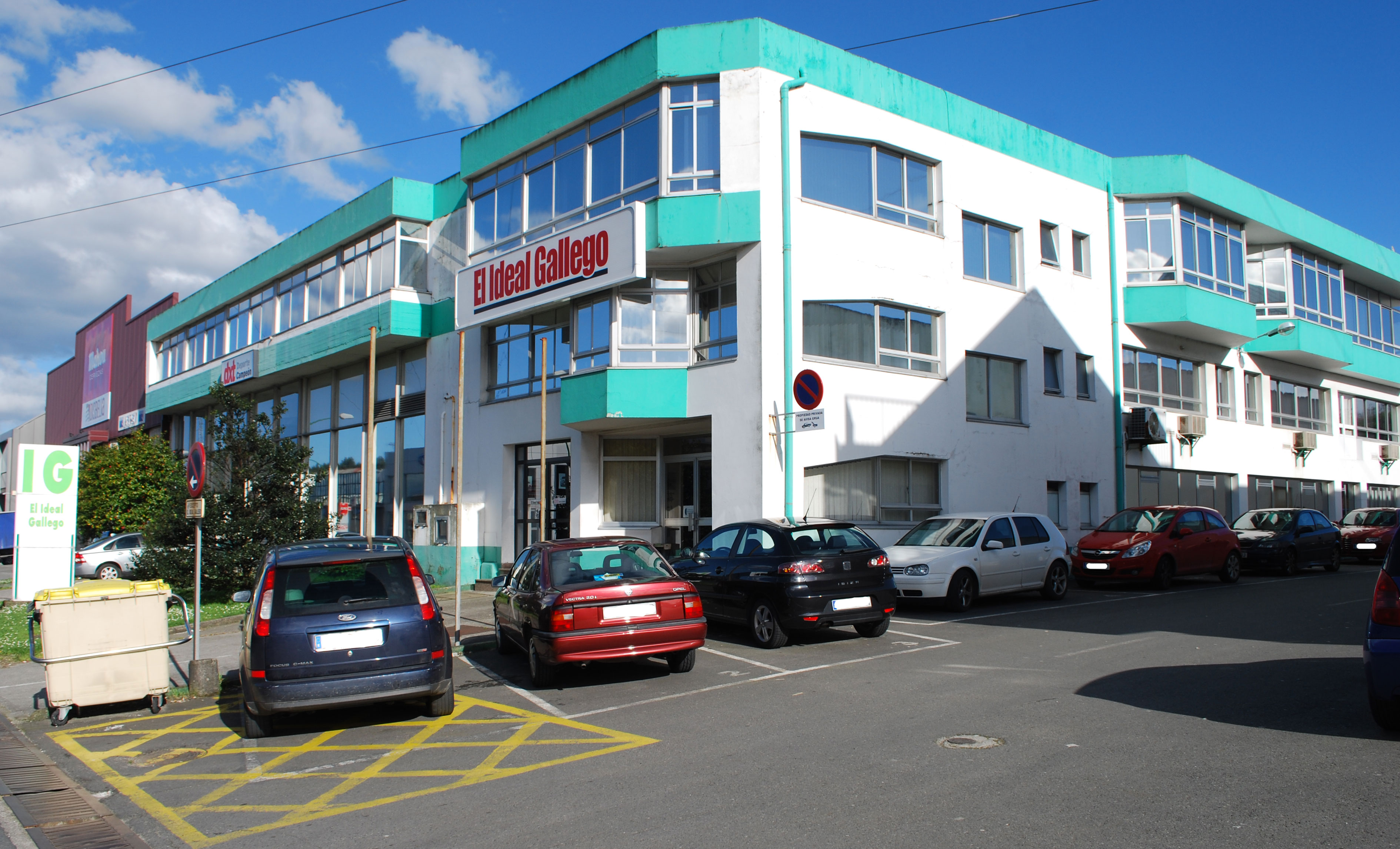 Sede do xornal El Ideal Gallego en Pocomaco A Coruña Galiza Spain